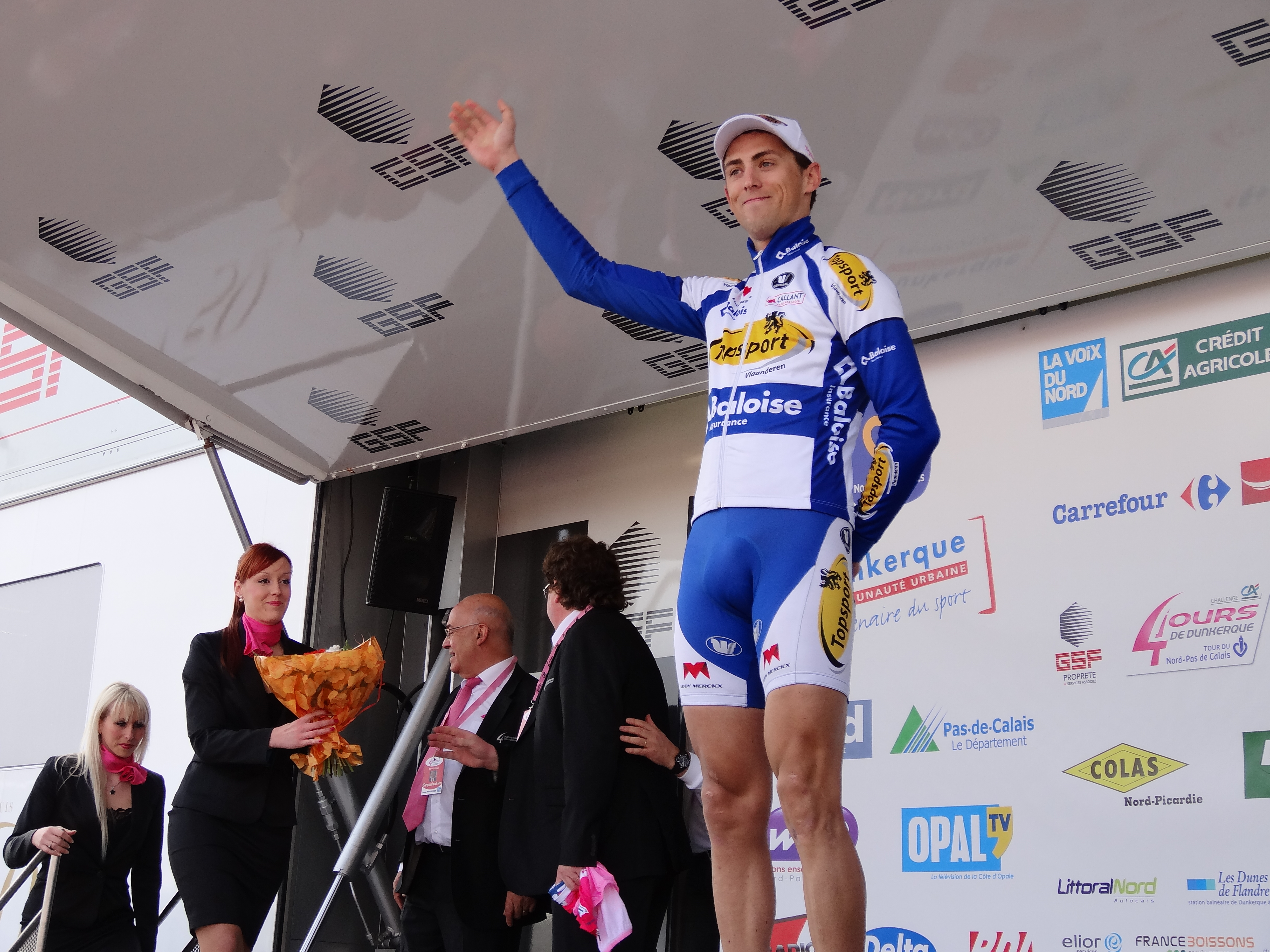 Reportage photographique réalisé le mercredi 1er mai 2013 à l'arrivée de la première étape de l'édition 2013 des Quatre jours de Dunkerque à Courrières, Pas-de-Calais, Nord-Pas-de-Calais, France, dans le bassin minier du Nord-Pas-de-Calais. L'arrivée a eu lieu à côté du carreau de la fosse no 1 de la Compagnie des mines de Courrières, première fosse à produire dans le Pas-de-Calais hors Boulonnais. Le dossier photographique montre les véhicules des équipes cyclistes, l'arrivée des cyclistes, et la remise des prix.